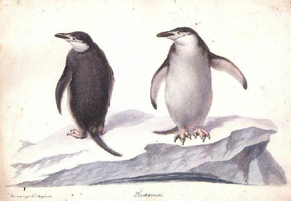 Михайлов Павел Николаевич - Пингвины